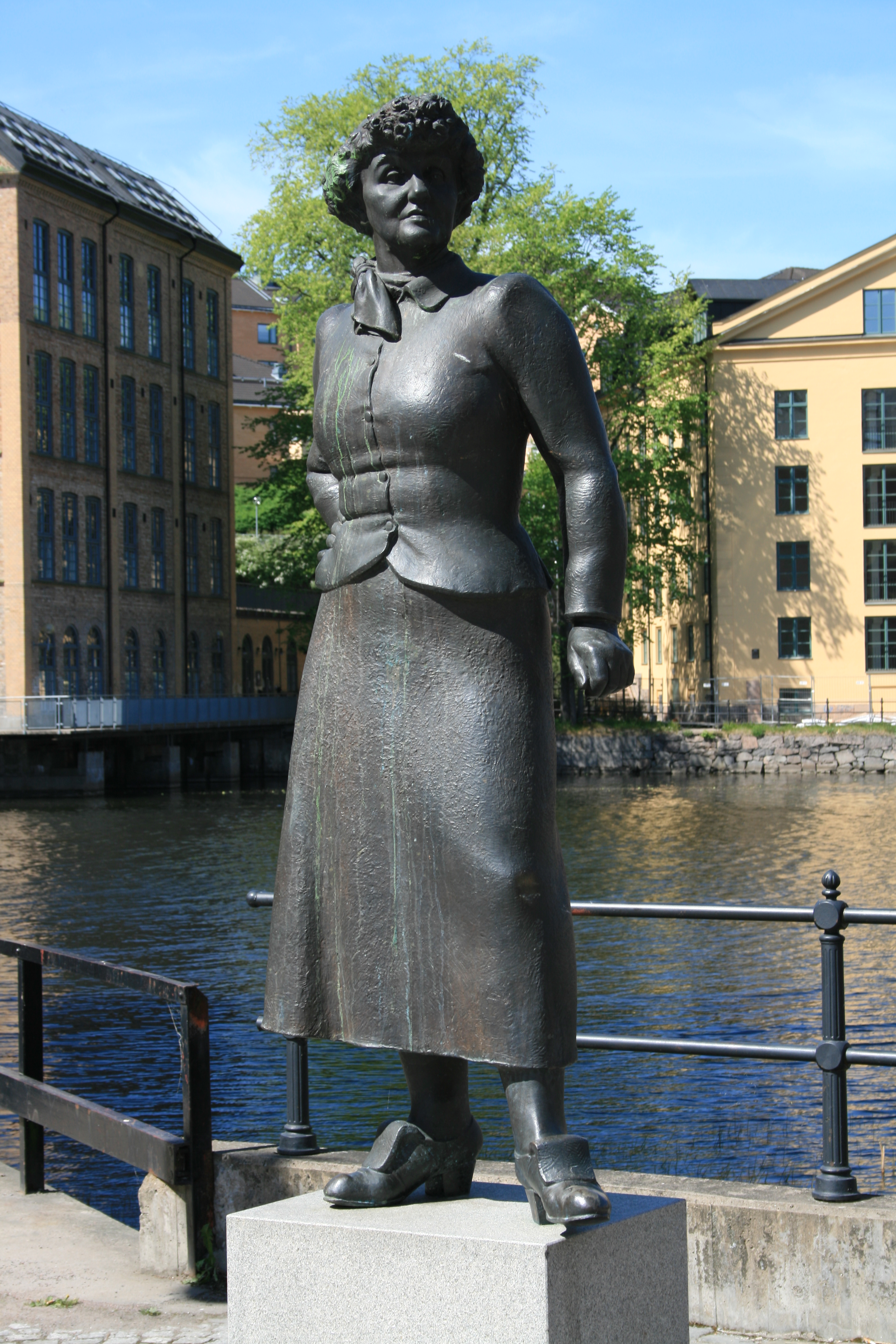 Staty av Moa Martinsson i Norrköping